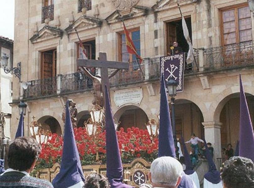 El Calvario de los Florines (siglo XVI) en la Plaza Mayor de Soria la mañana de Viernes Santo. Momento en el que se predica la V Palabra desde el Ayuntamiento.